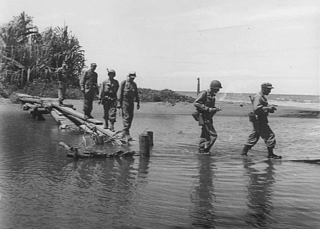 US Army troops crossing a bridge in Gasmata